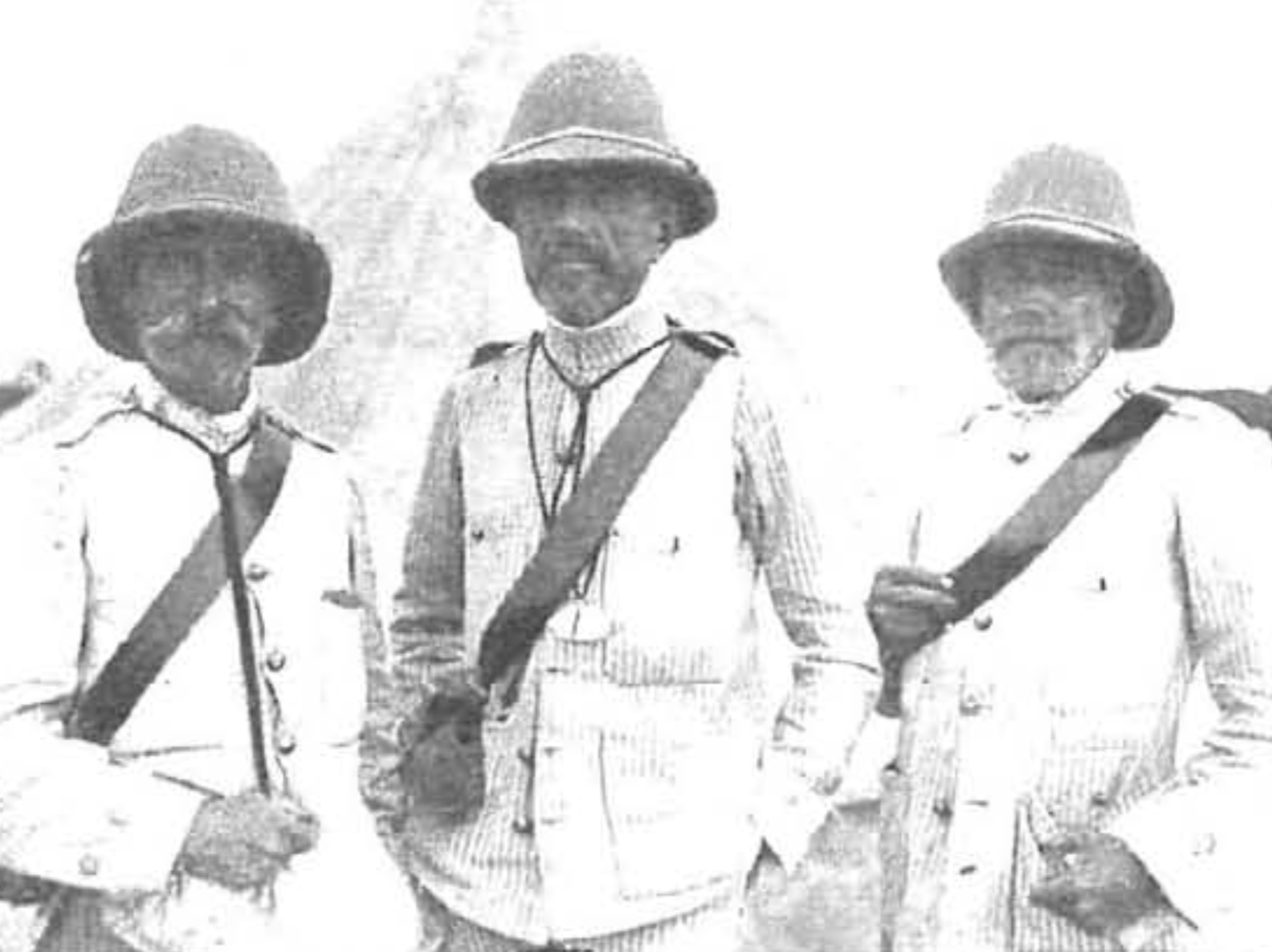 El coronel, el teniente coronel y un comandante de Húsares de la Princesa con los salacots que usan desde hace pocos días las tropas de operaciones del Rif.